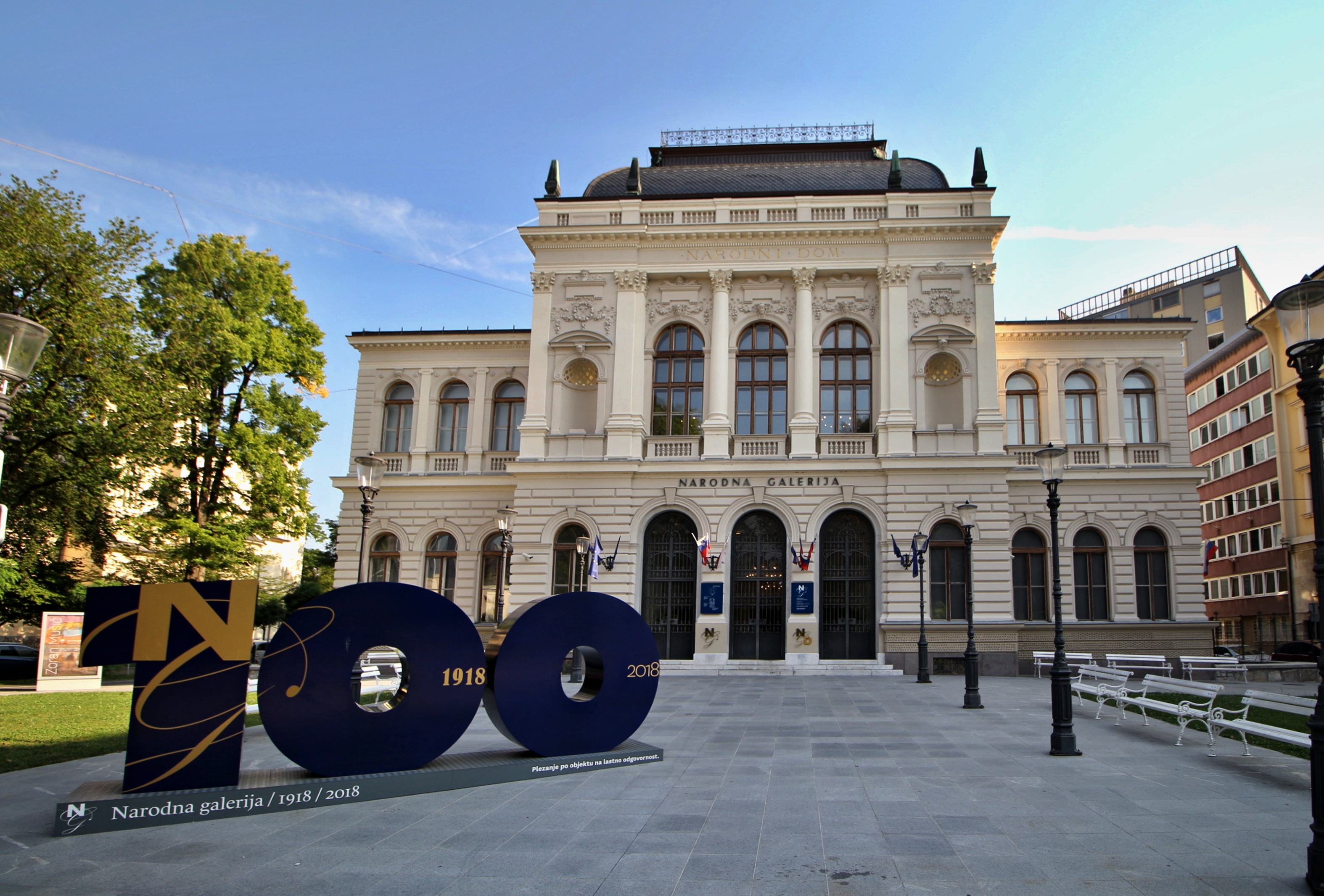 Budova Slovinské národní galerie v Lublani